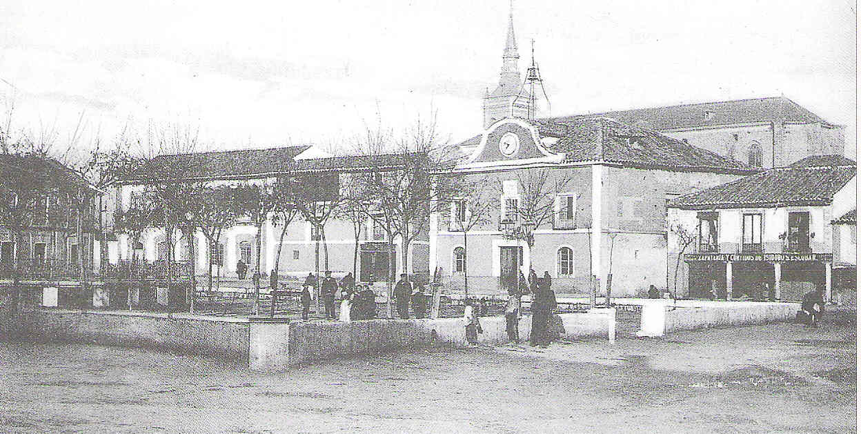 Plaza de España en 1930. Torrijos (Toledo)